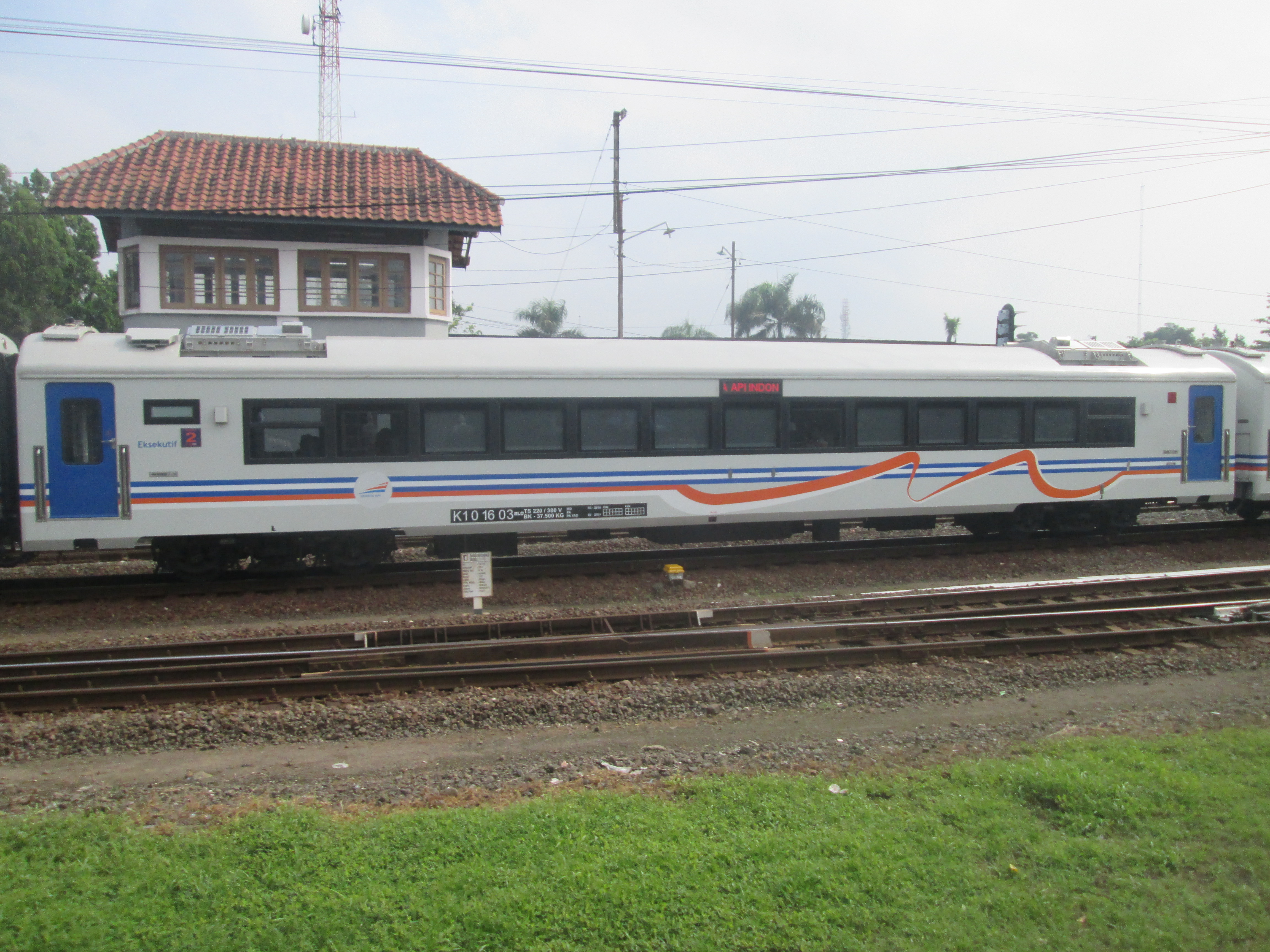 Kereta api Argo Lawu melintas di stasiun Lempuyangan dengan membawa kereta eksekutif baru produksi PT INKA tahun 2016